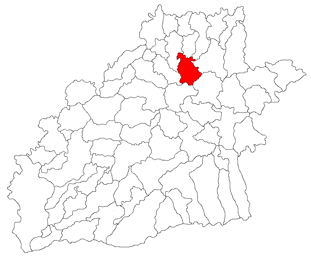 Categorie:Hărţi ale judeţului Sibiu